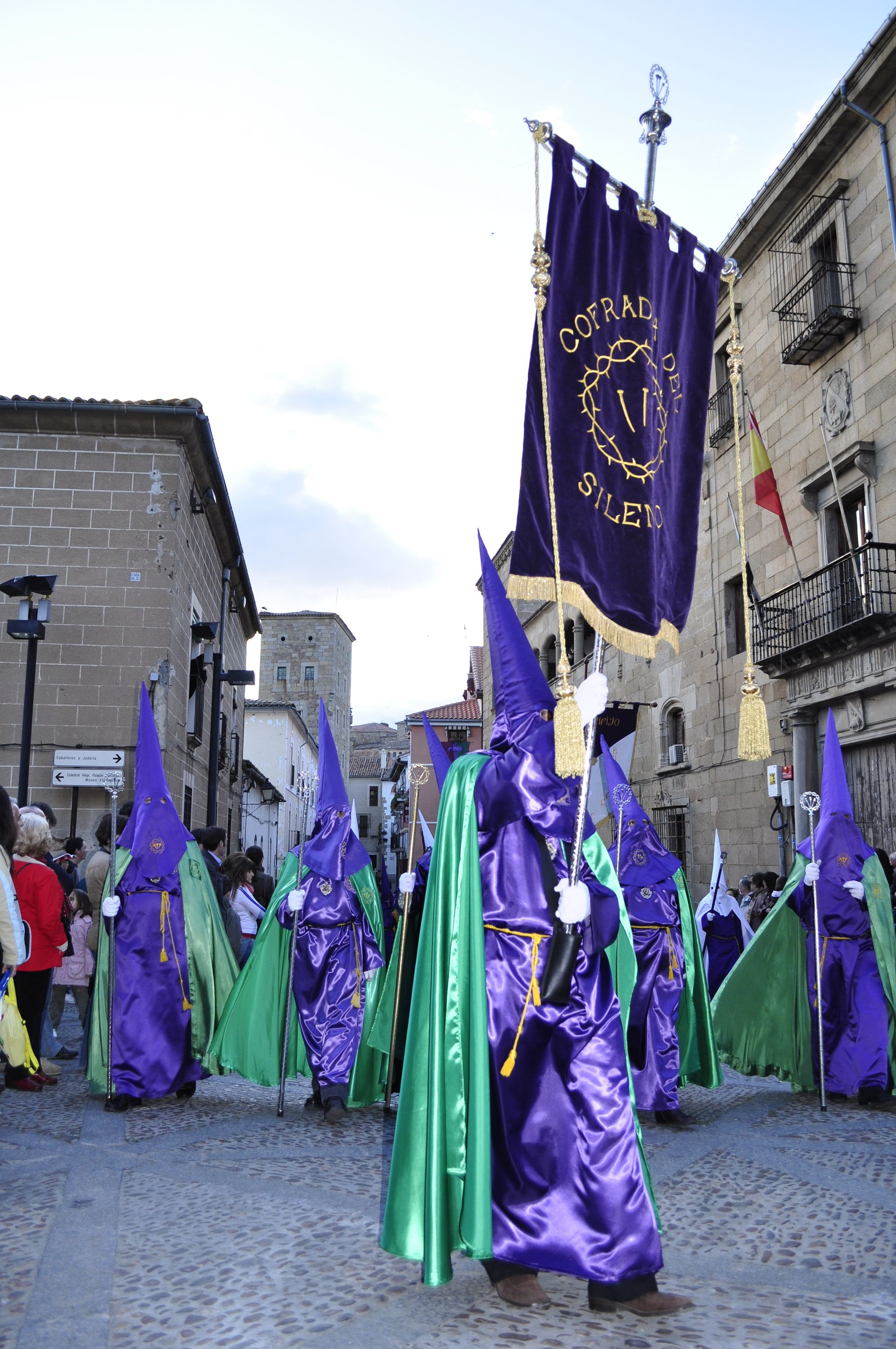 Cofradia de la Soledad y Santo Sepulcro. Hermano Mayor: Narciso Juanals Parroquia: Santo Domingo Año de Fundación: Comienzos del Siglo XV Hermano Mayor: Narciso Juanals Hora de salida: 19,30 horas Pasos:Nuestra Señora de la Soledad, Santo Sepulcro, San Juan María Magdalena y San Pedro Acompañamiento musical: La banda de música de la OJE de Plasencia Número de hermanos de la cofradía: 700 (